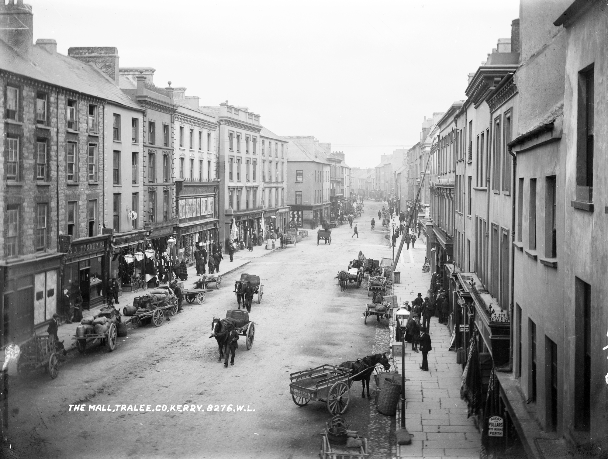 Date: 1905?? NLI Ref.: L_ROY_08276